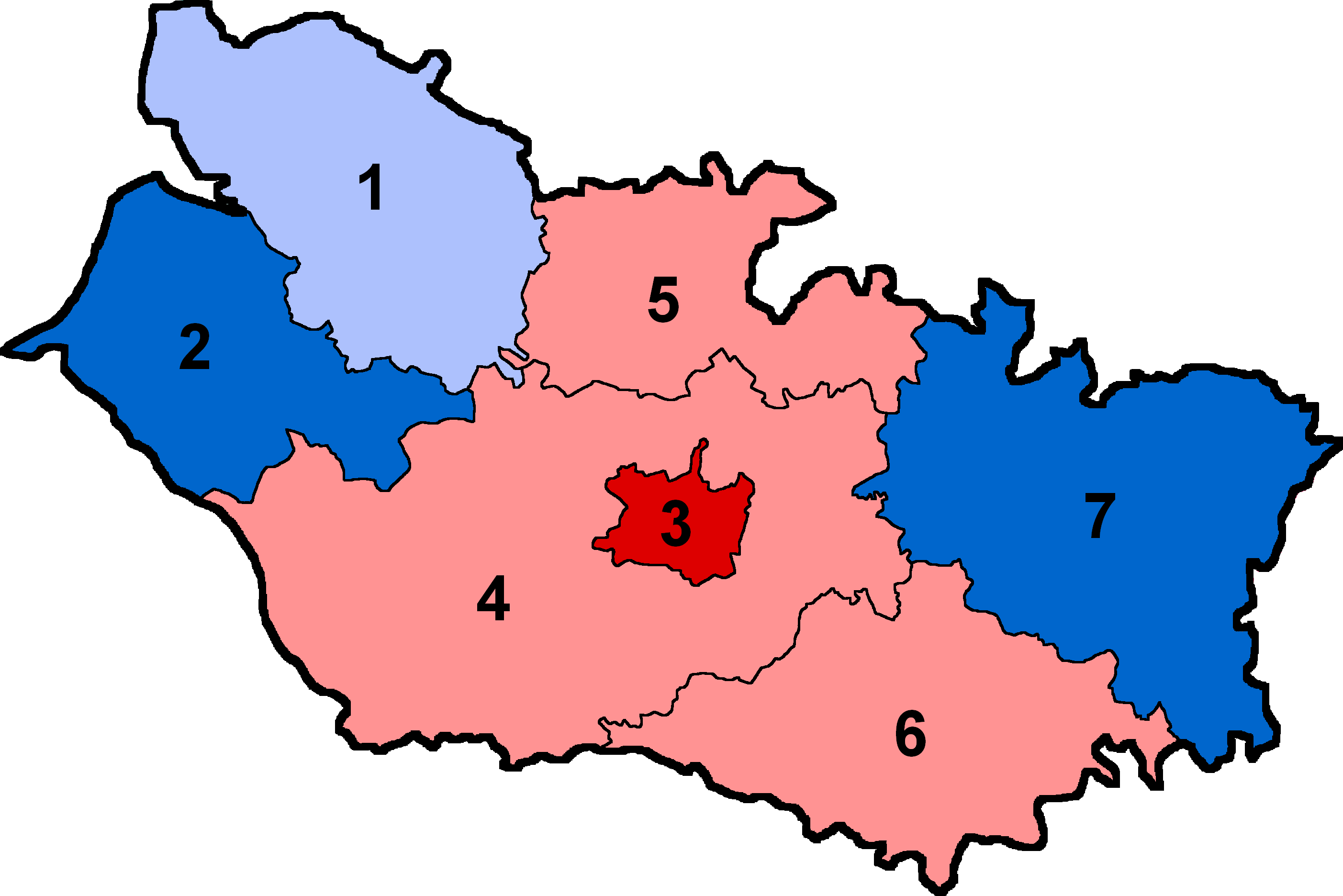 Députés de la Somme en 1909